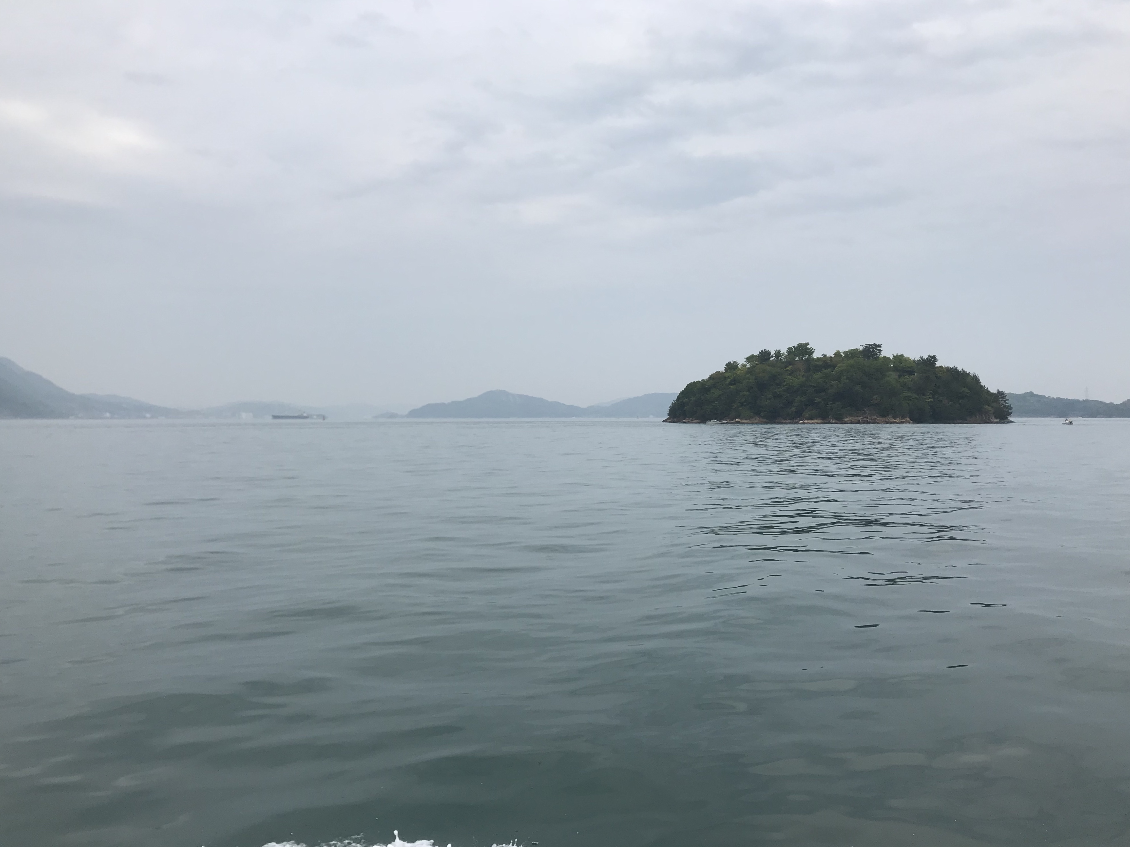 土生港行きの高速船より望む宿禰島と細島